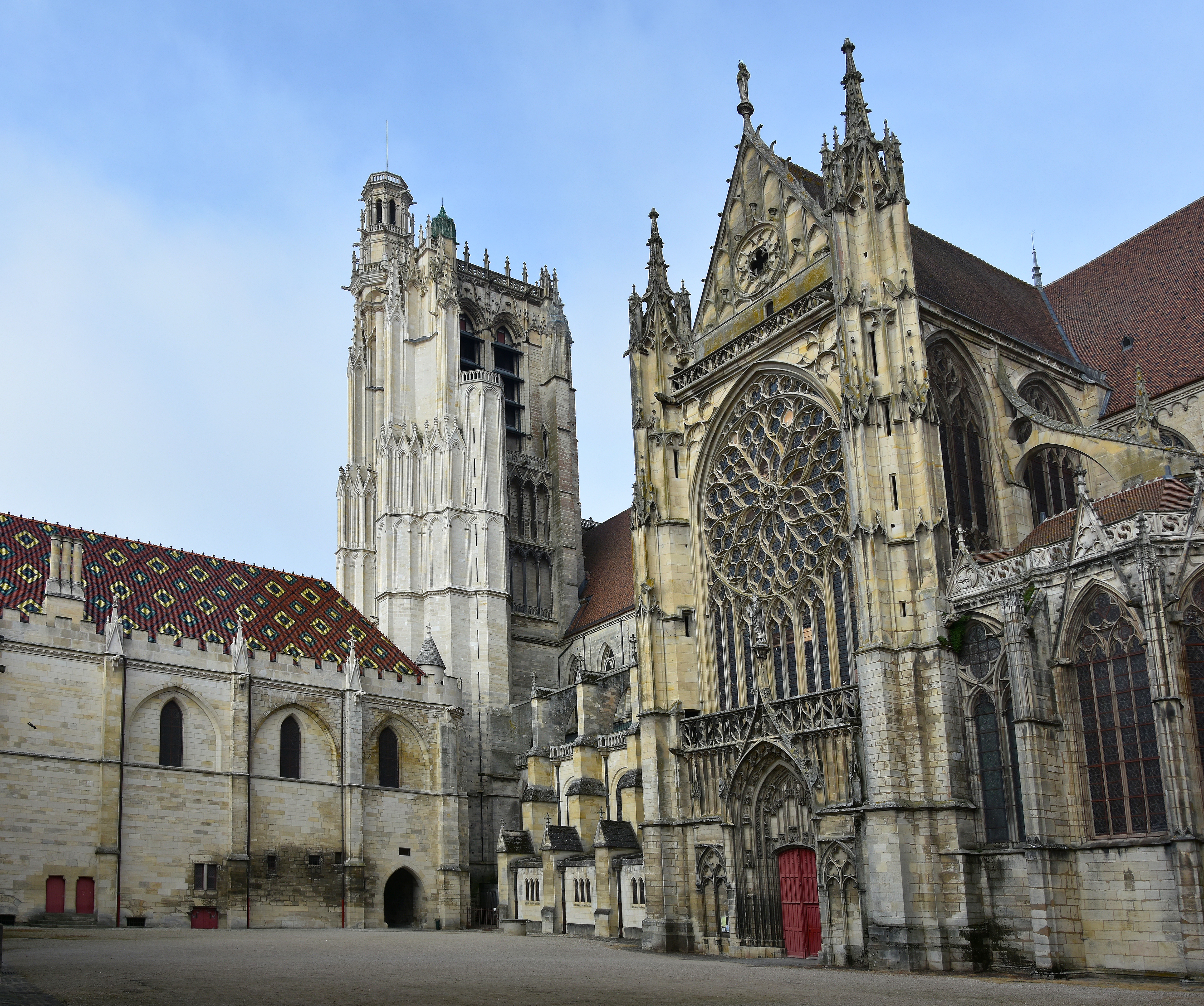 De kathedraal van Sens met zicht op de zuidelijke toren en de westgevel vanop het binnenplein met links het synodaal paleis